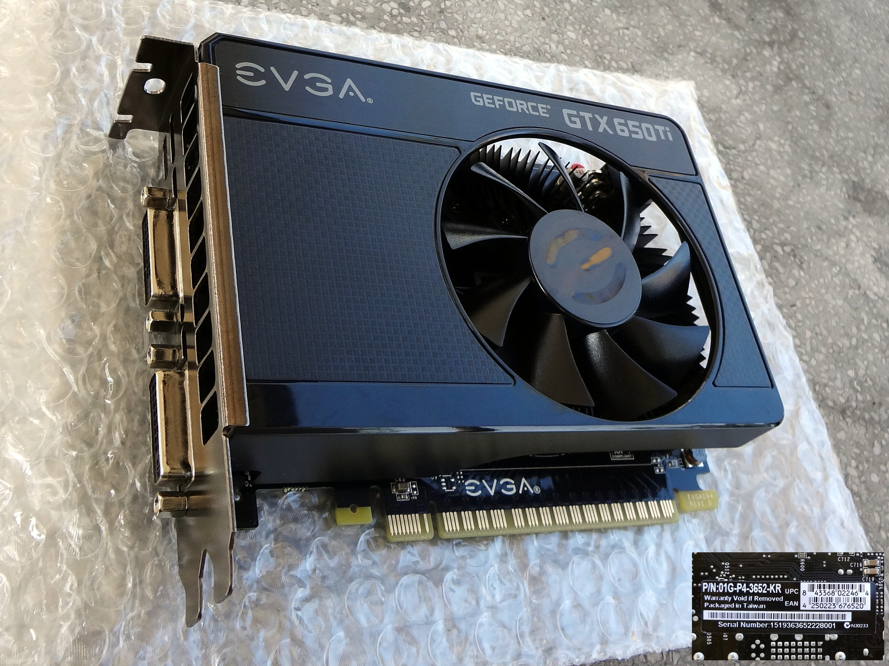 艾維克（EVGA）顯示卡「EVGA GeForce GTX 650 Ti SSC」，型號01G-P4-3652-KR，採用NVIDIA GeForce GTX 650 Ti顯示晶片。